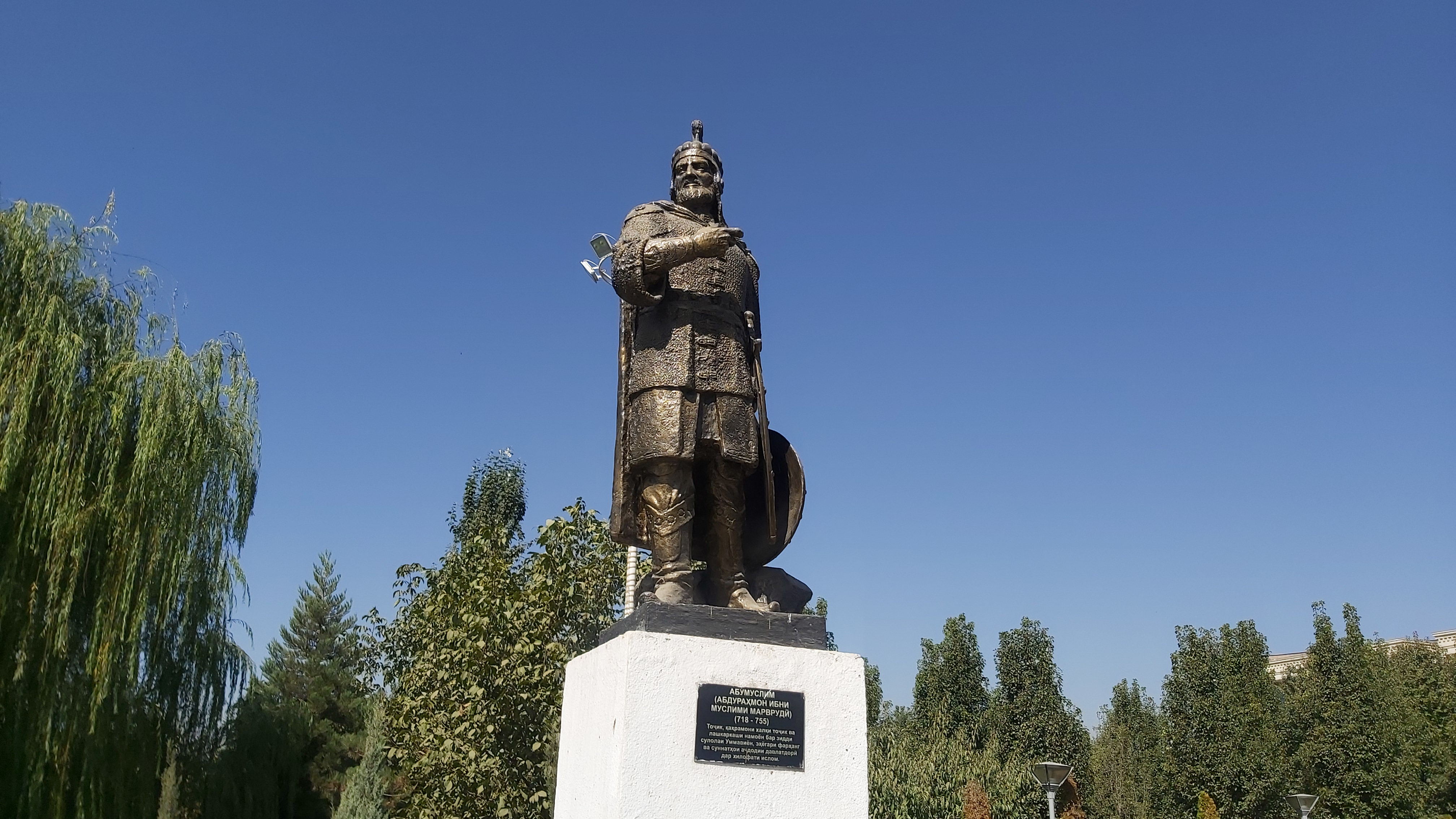 Абу Муслим